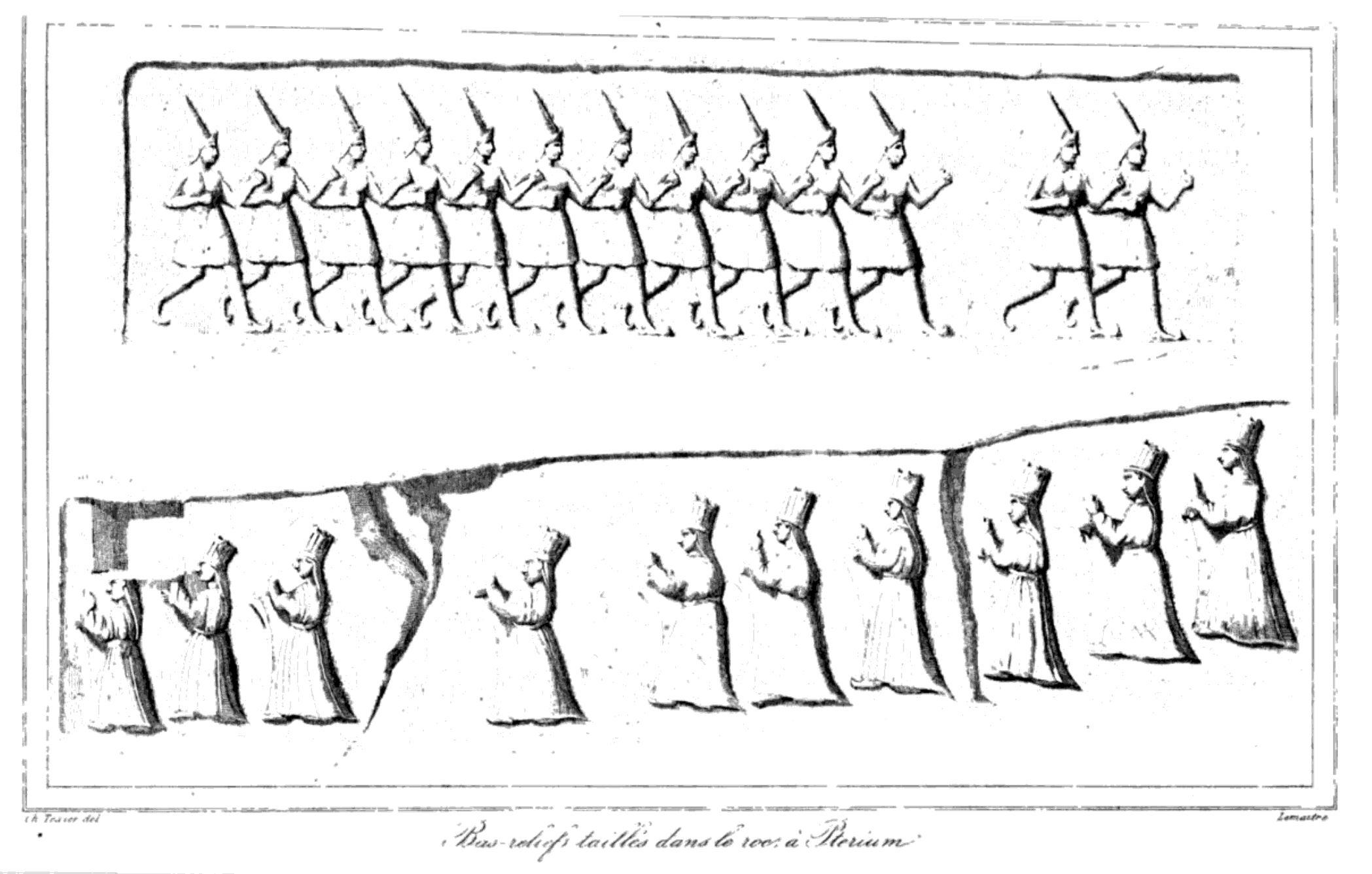 Reliefs aus dem hethitischen Heiligtum von Yazilikaya bei Hattusa, Zentraltürkei, Zeichnung von Charles Texier